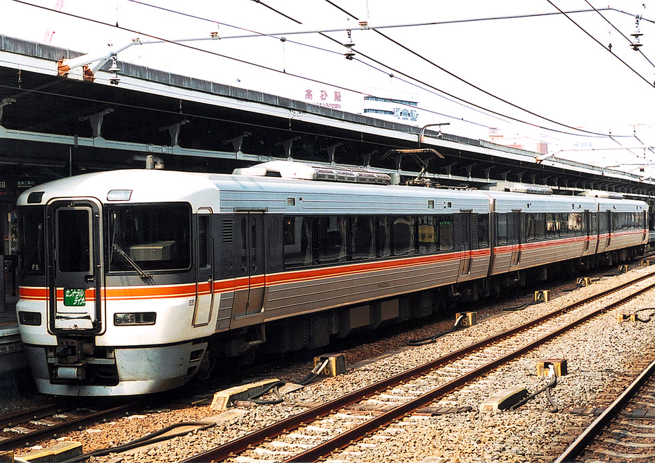 JR東海 373系特急電車「セントラルライナー」